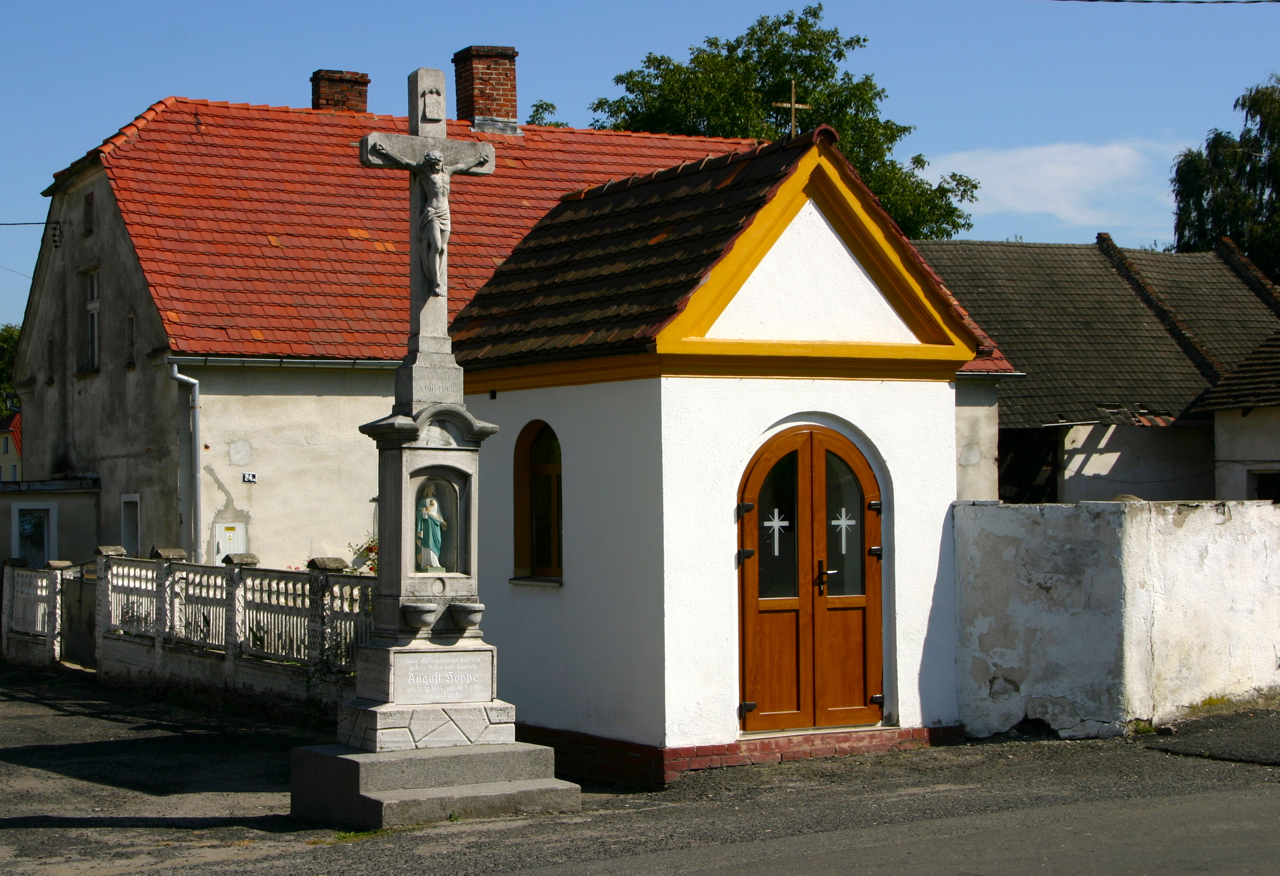 Nowy Browiniec – wieś w Polsce położona w województwie opolskim, w powiecie prudnickim, w gminie Lubrza. Kaplica przydrożna (nr 24a), XIX w.